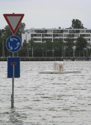 Kunstinstallation "Galerie auf der Schlei" Schleswig 2008